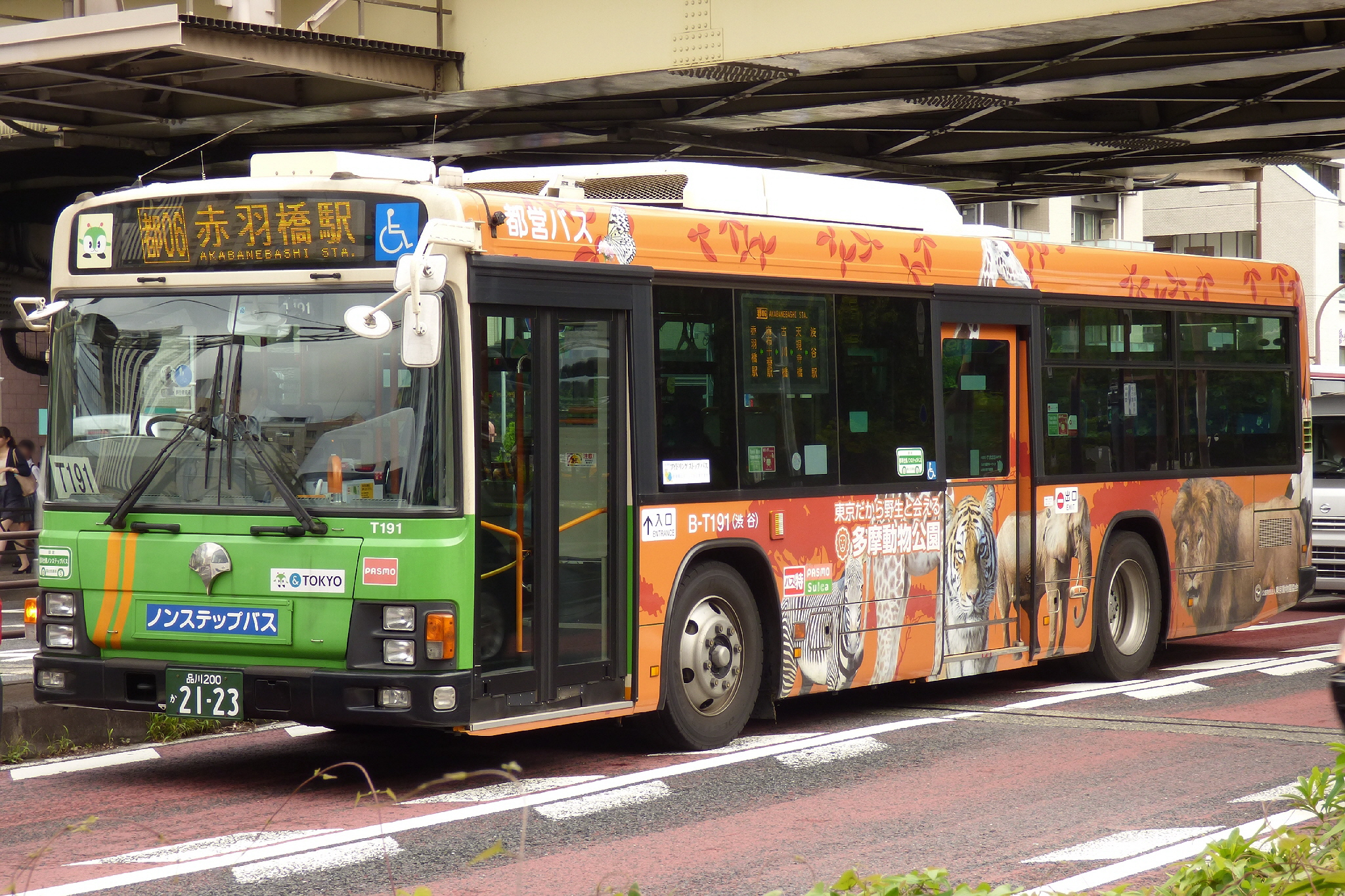 都営バス渋谷営業所のT191（いすゞ・エルガ）